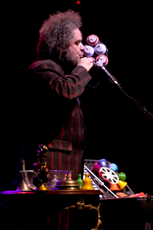 AFP